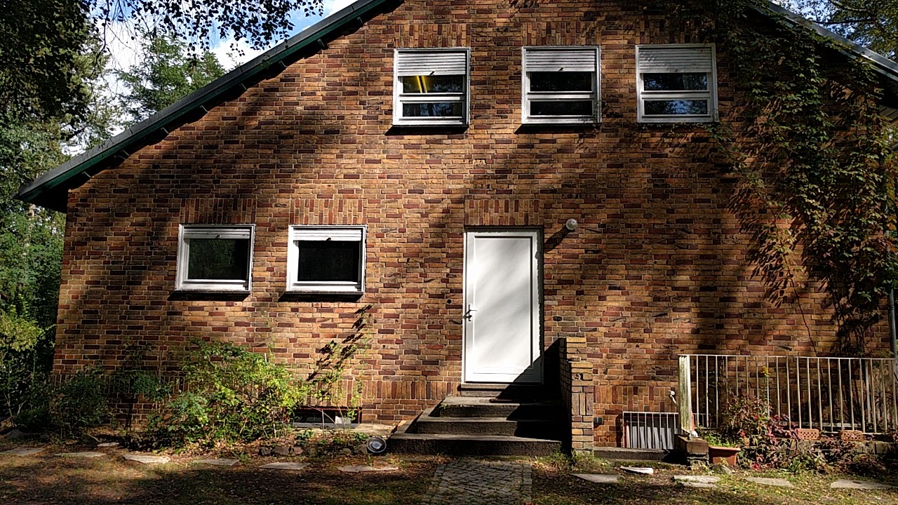 Eines der 20 Siedlungshäuser in der Waldsiedlung Lehnitz Nord, 1938-1943 errichtet von dem Architekten Klaus Heese für die Deutsche Luftwaffe.